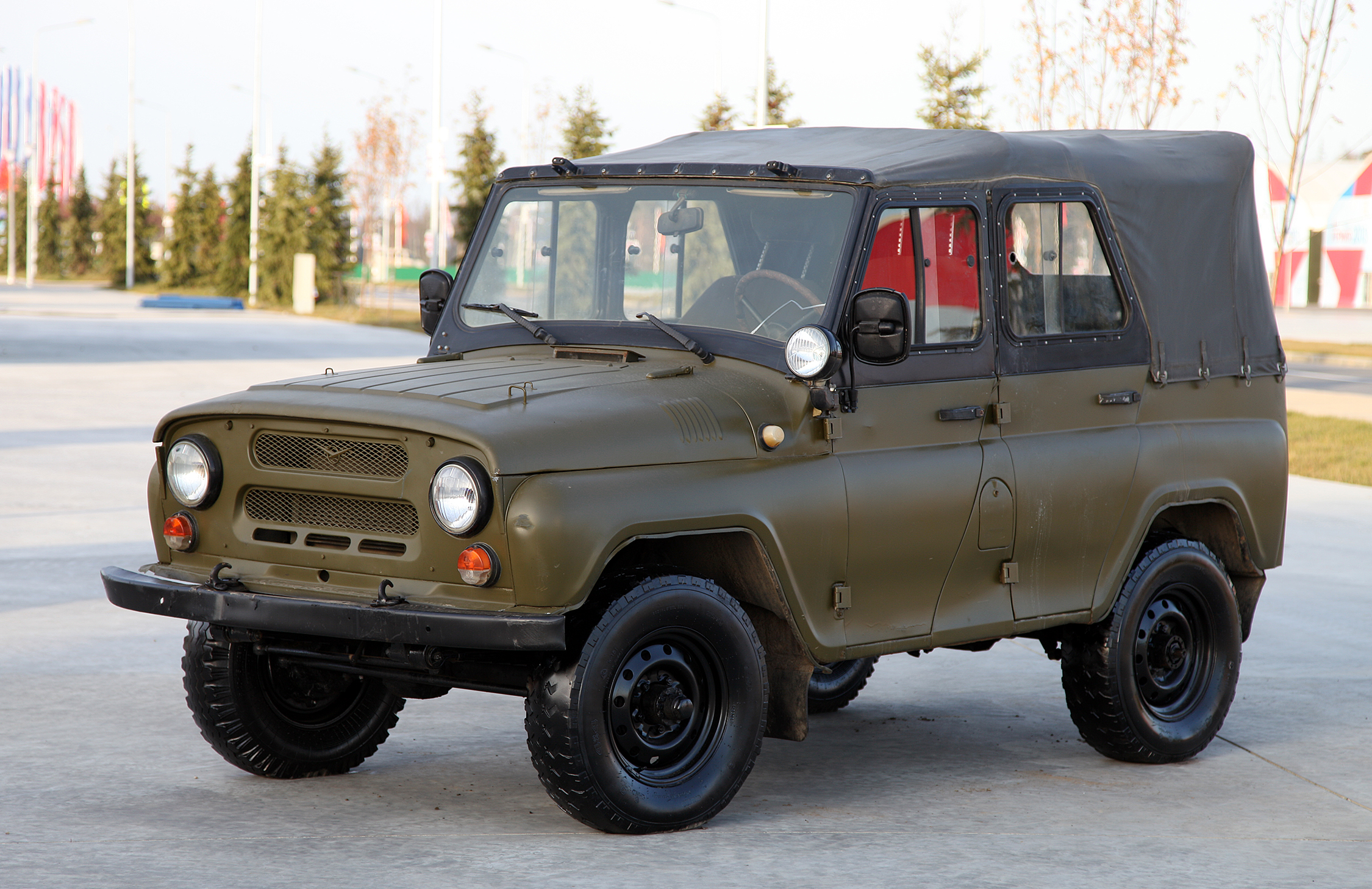 УАЗ-469 (UAZ-469)